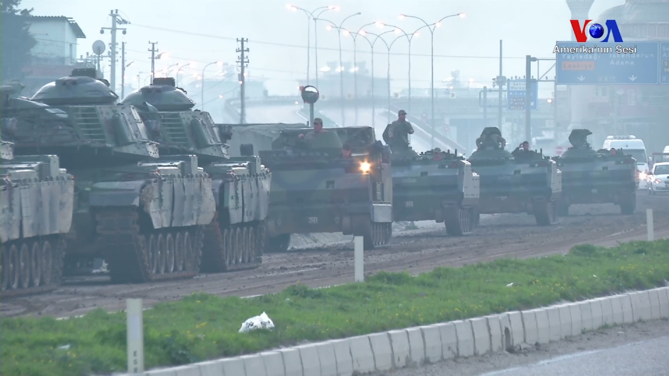 “Zeytin Dalı Harekatı" Afrin’deki hedefleri bombalanmasıyla başladı. Hatay’ın Reyhanlı ve Kırıkhan ilçeleri arasındaki sınır hattında 2. Ordu Komutanlığına bağlı birliklerden gelen çok sayıda tank ve zırhlı araç ikinci bir emre kadar yol boyunca bekletiliyor.